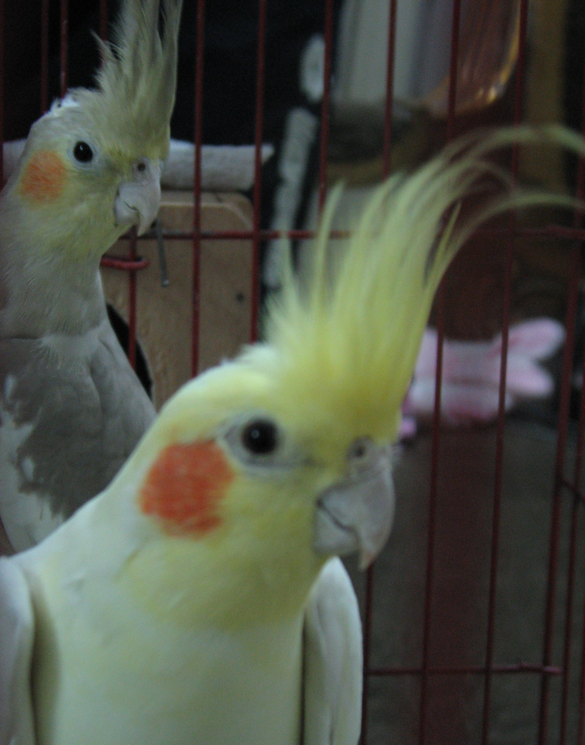 2 كوكاتيل الاول ذكر من نوع lutino و الثانى انثى من نوع الرمادى العادى .